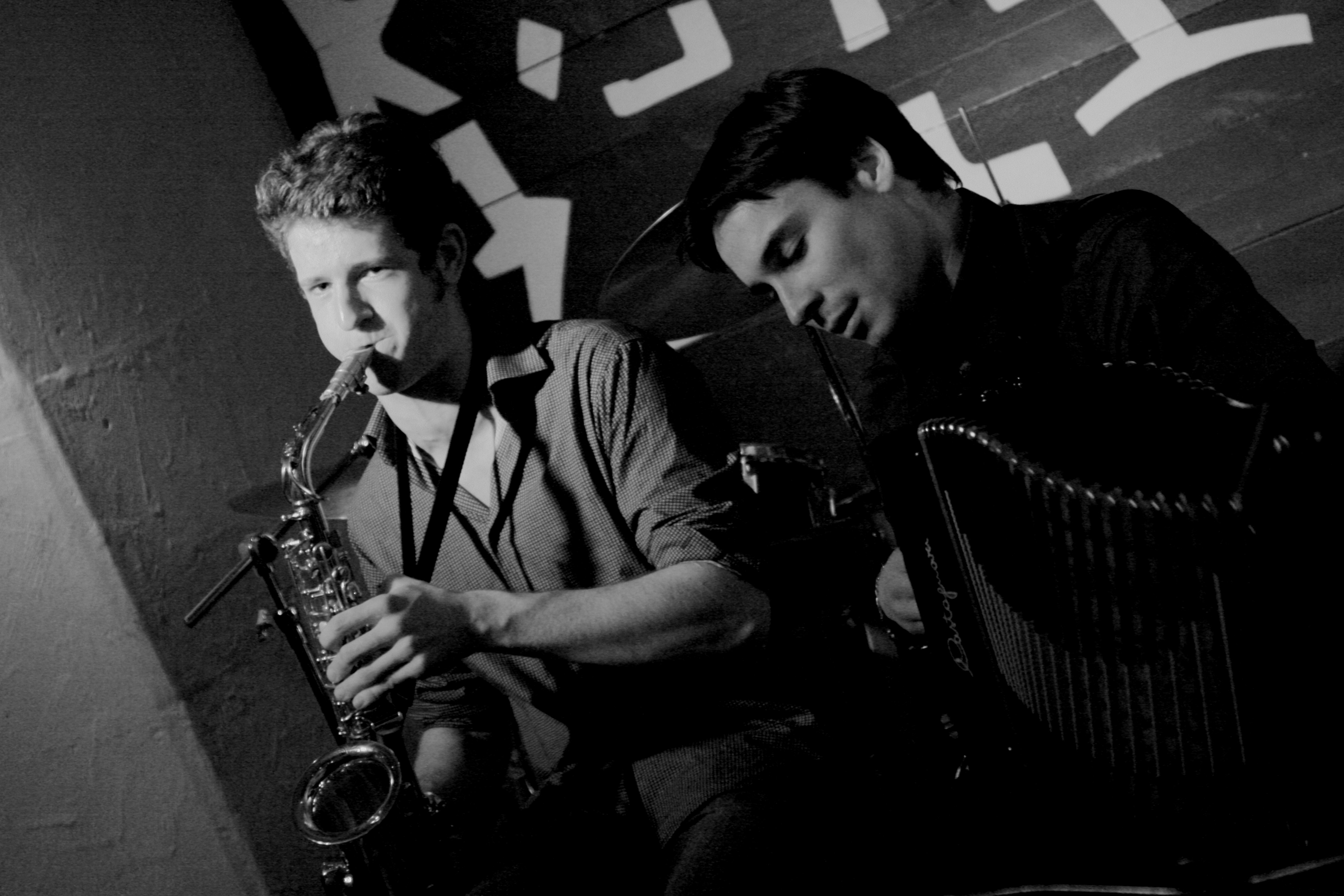 An daouad Le Bour ha Bodros